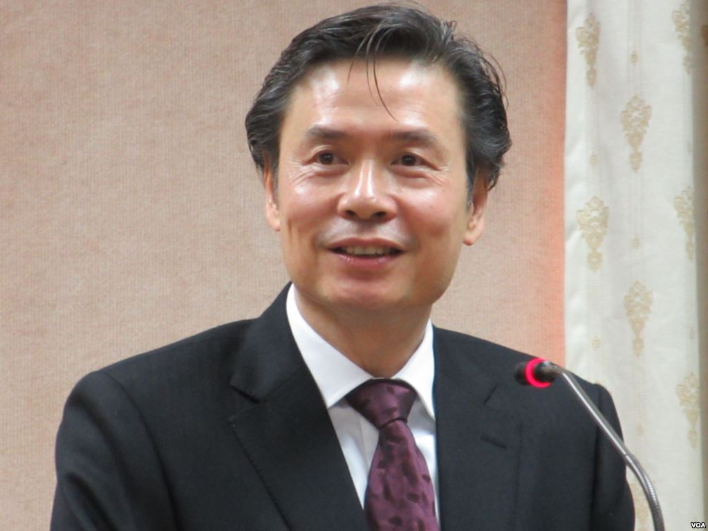 中華民國駐美國大使金溥聰。